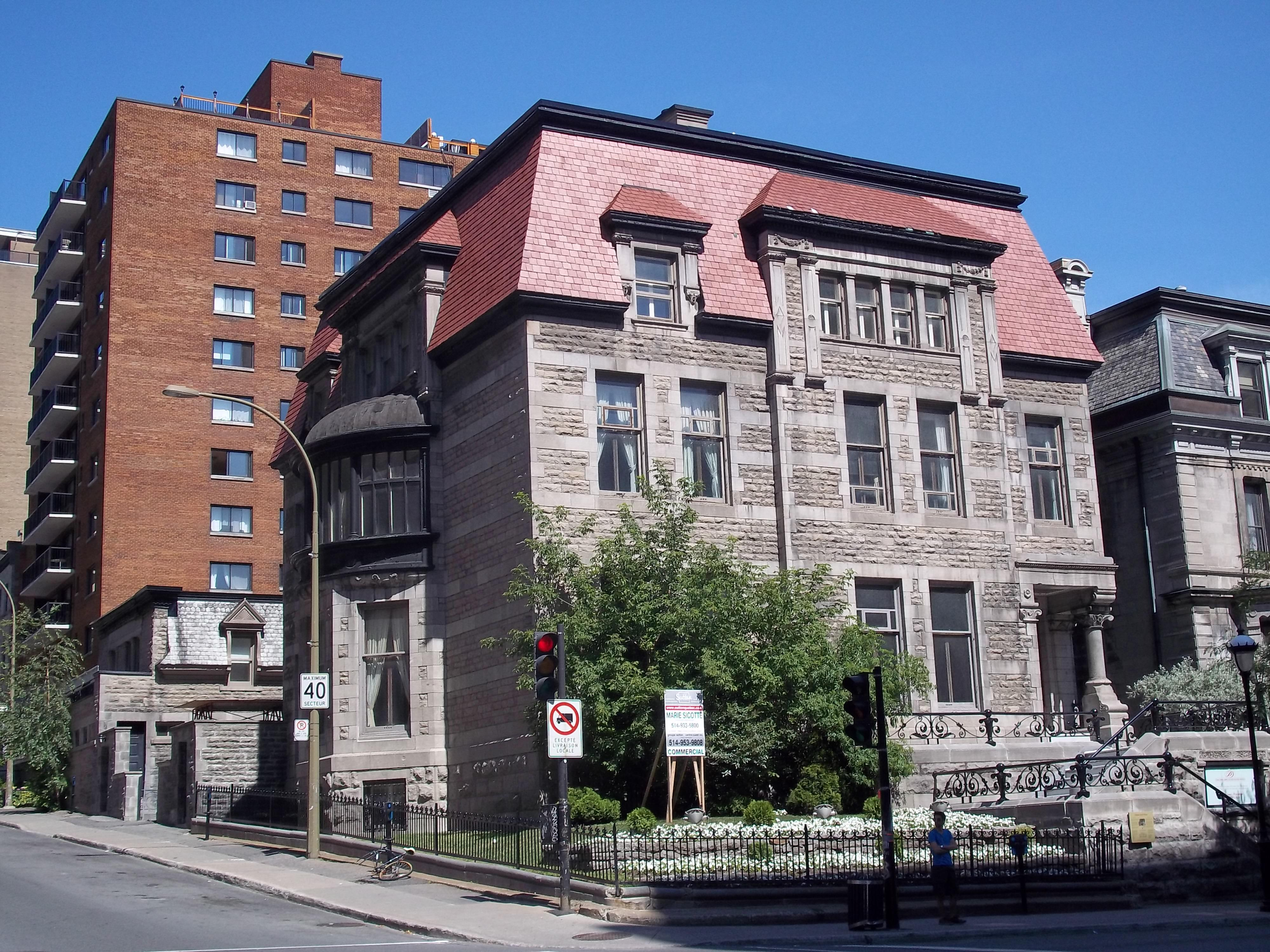 Maison James-Reid-Wilson, 1201, rue Sherbrooke ouest, Montréal